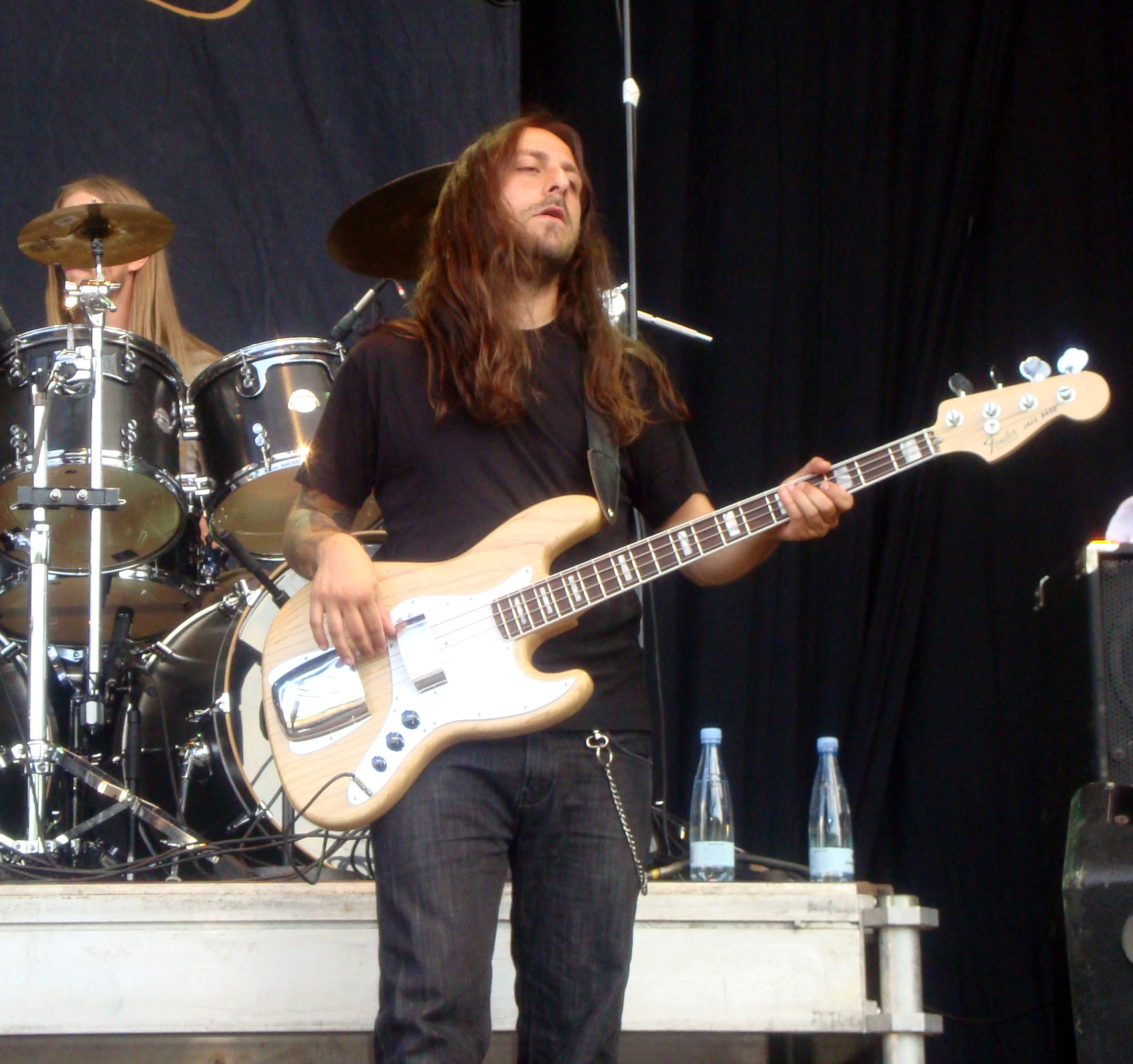 Bassisten Martín Méndez fra den svenske gruppe Opeth under gruppens koncert til Copenhell 2011.